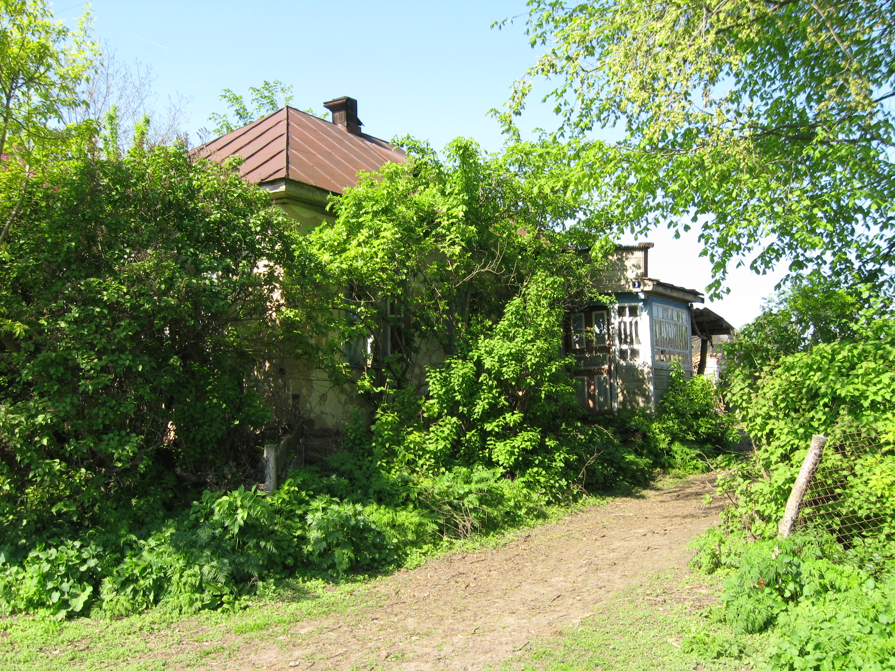 Будинок Кукси Любові Сергіївни